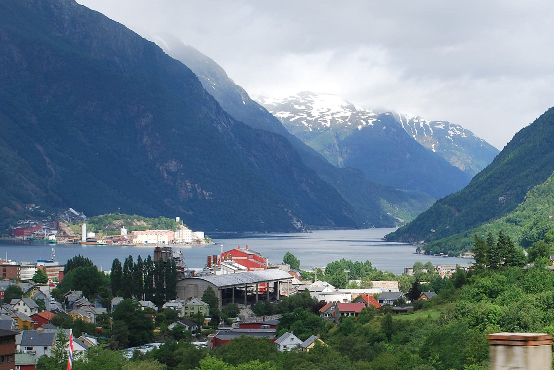 Odda (Noruega)